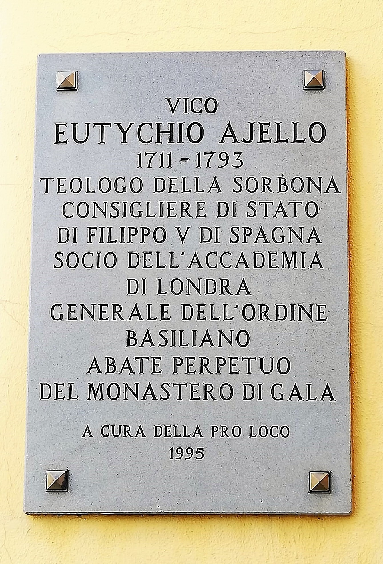 Targa apposta nel vicolo intitolato a Eutichio Ajello nella città di Barcellona Pozzo di Gotto.